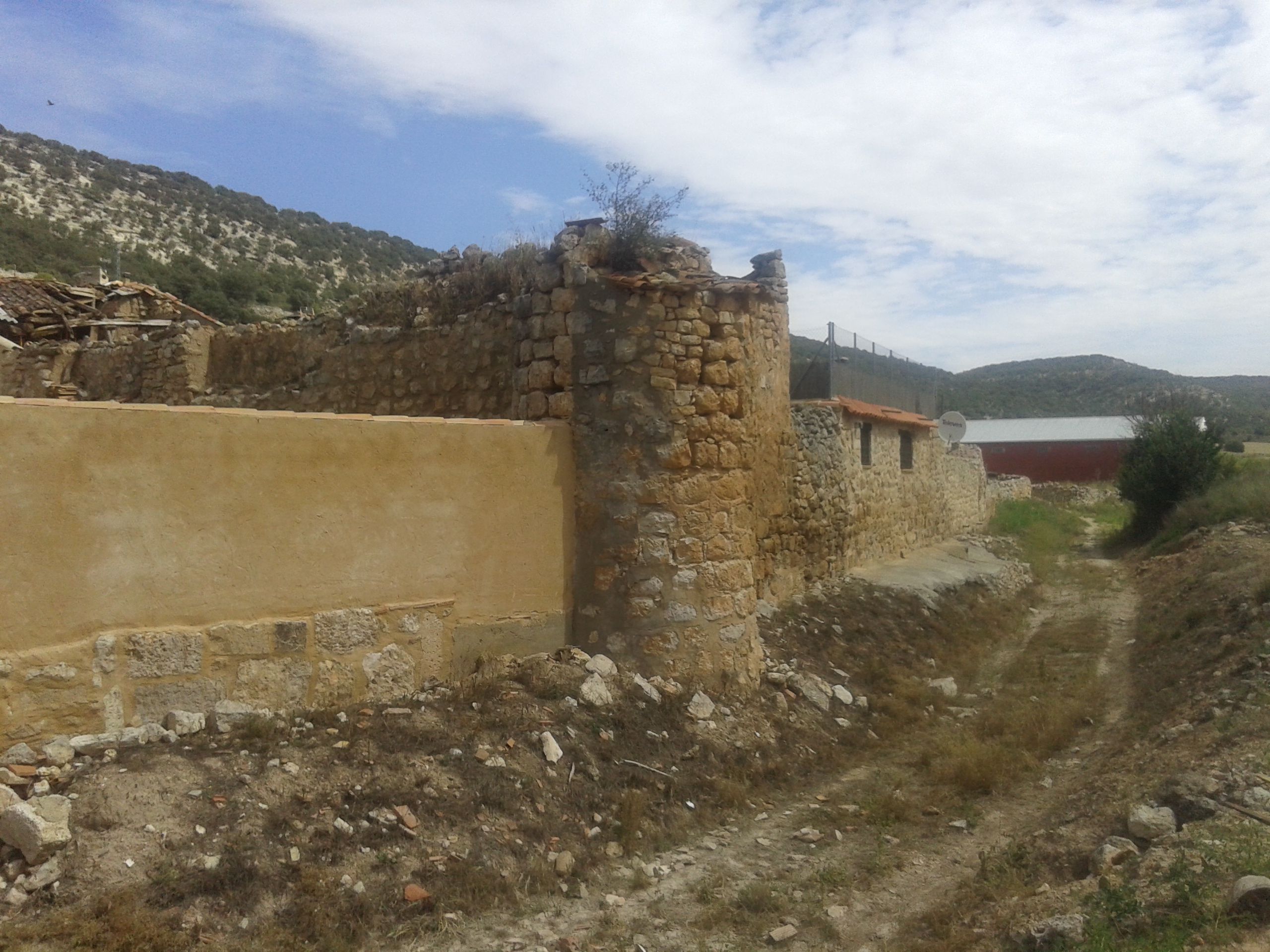 Restos de la muralla y de un torreon de la población de Fuentegelmes.